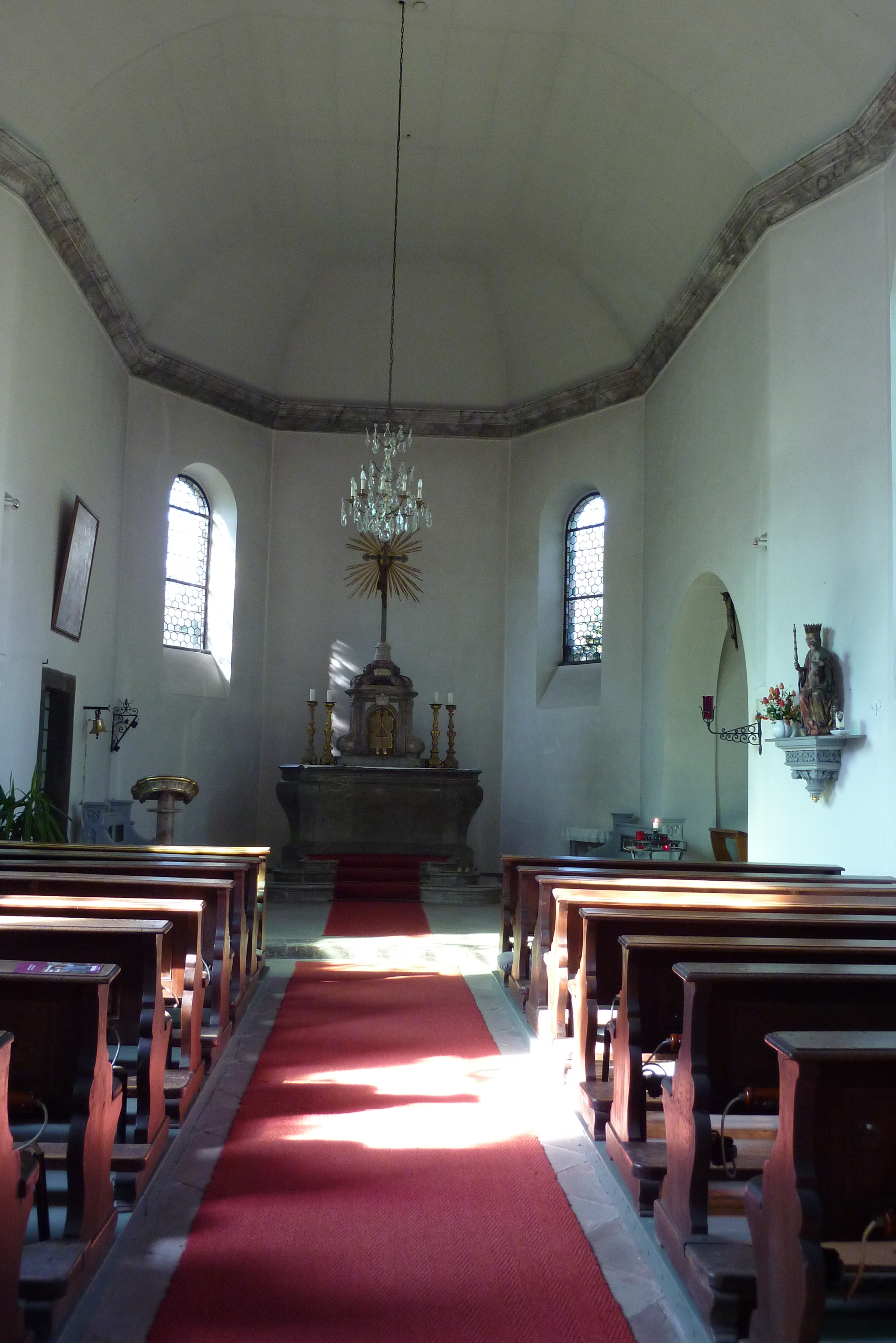 katholische Kapelle St. Antonius Eremit in Kreuzberg, einem Ortsteil von Altenahr